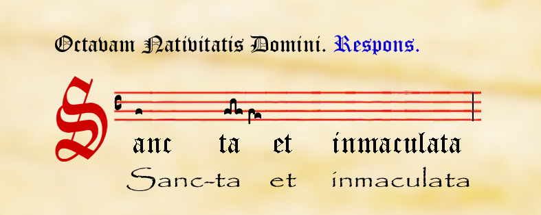 Tropo Prosula "Sancta et Inmaculata", Responso Octavo Domingo de Navidad